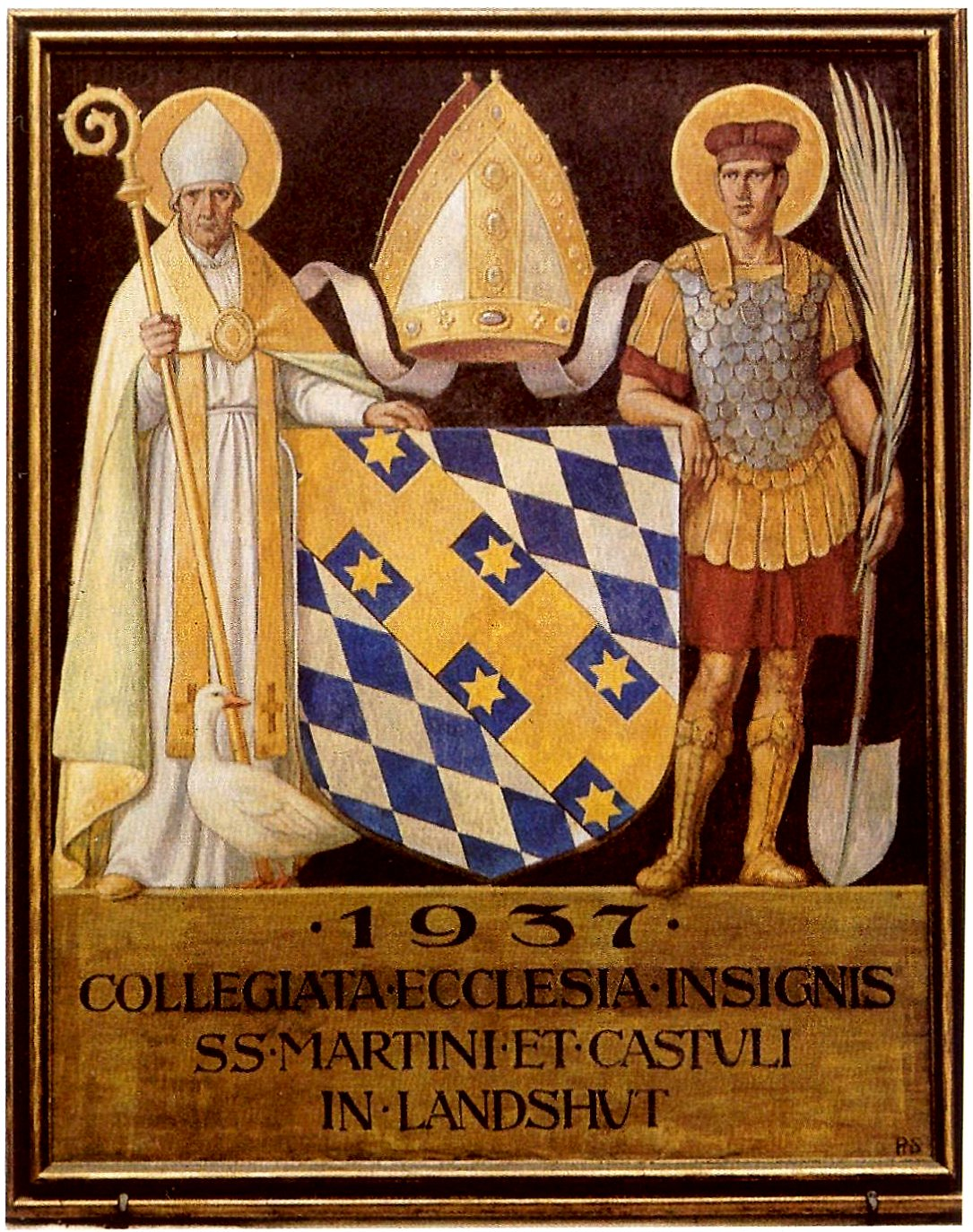 Wappenbild mit den beiden Patronen der Stiftsbasilika in landshut - St. Martin und Hl. Kastulus.